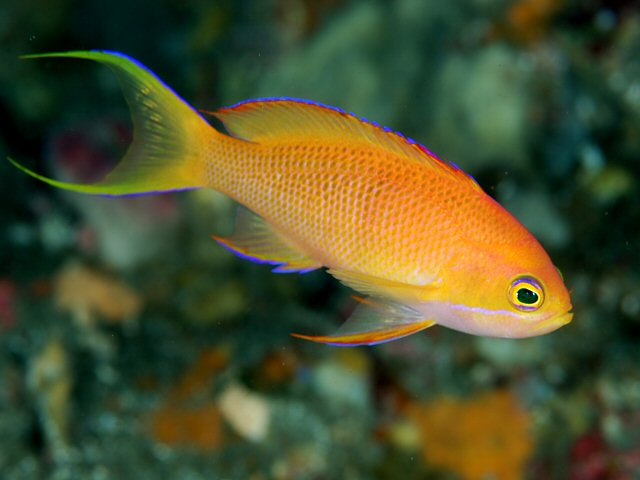 シロオビハナダイ♀ Pseudanthias leucozonus